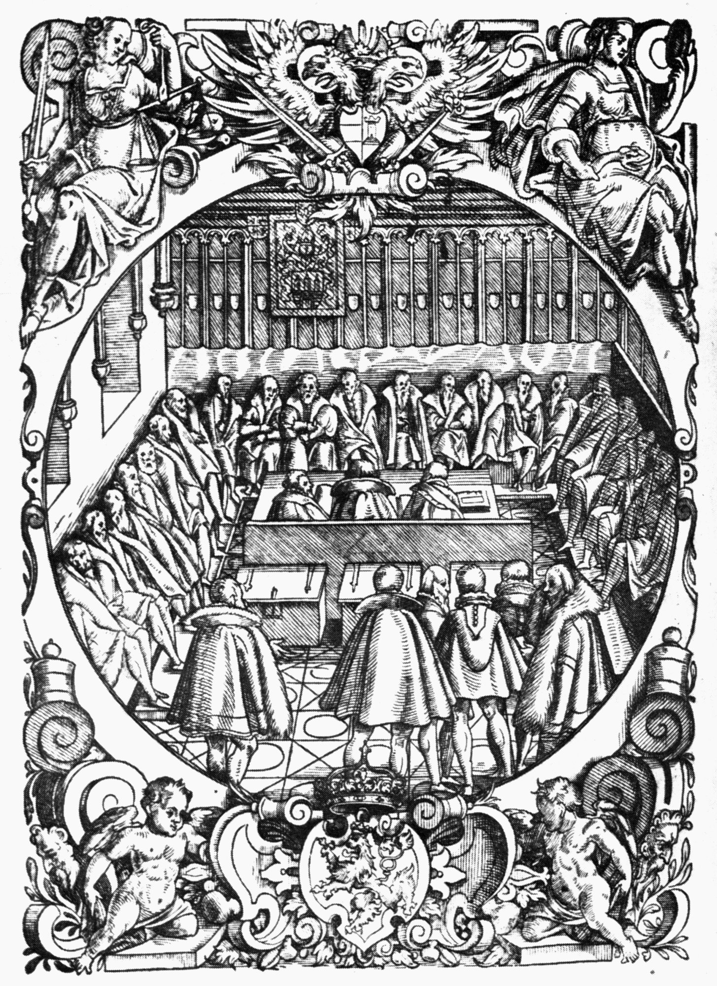 Zasedání Pražské městské rady, ilustrace z knihy Práva městská Království českého od Pavla Kristiána z Koldína z roku 1579